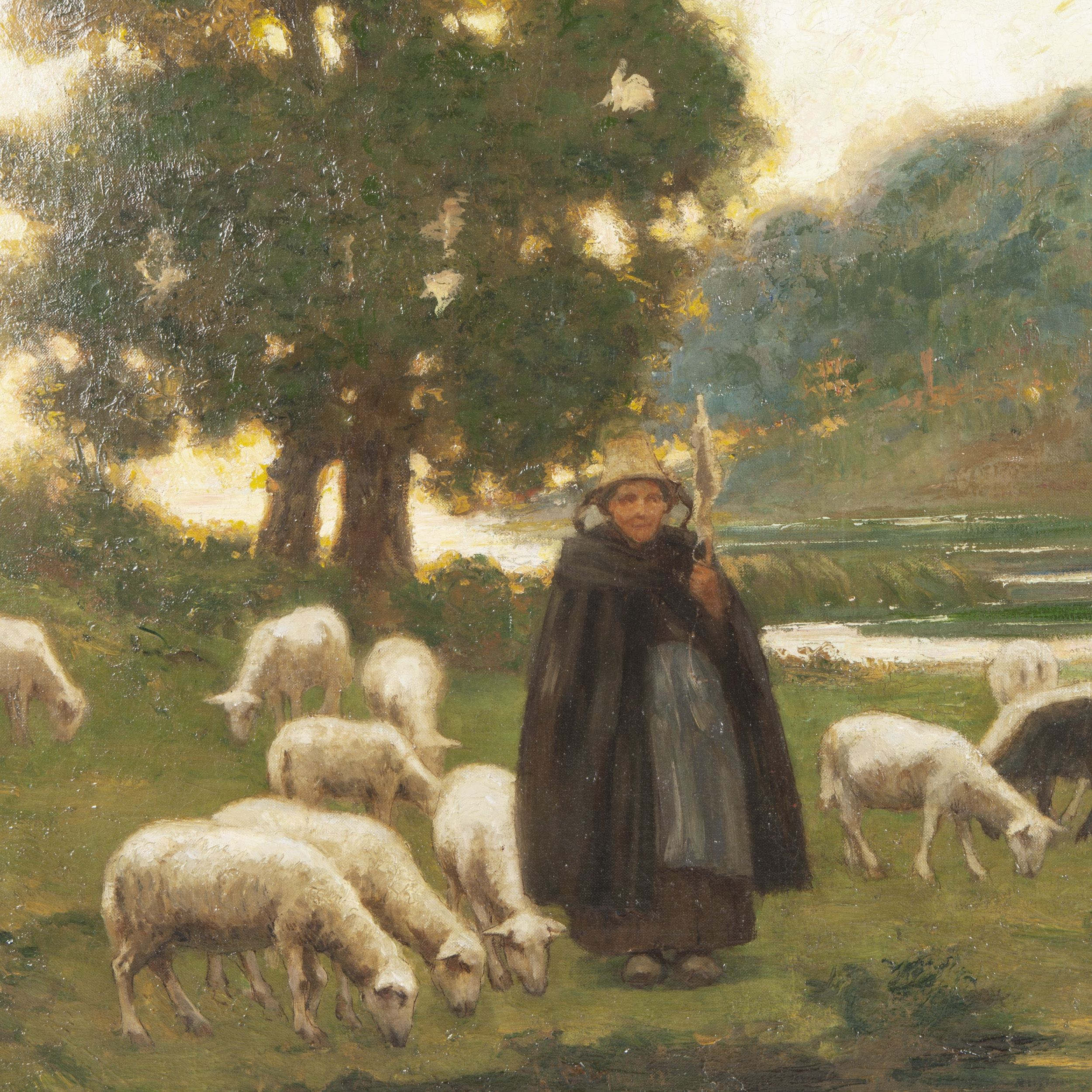 Bergère et son troupeau au repos